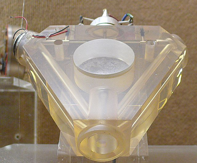 Gyrolaser